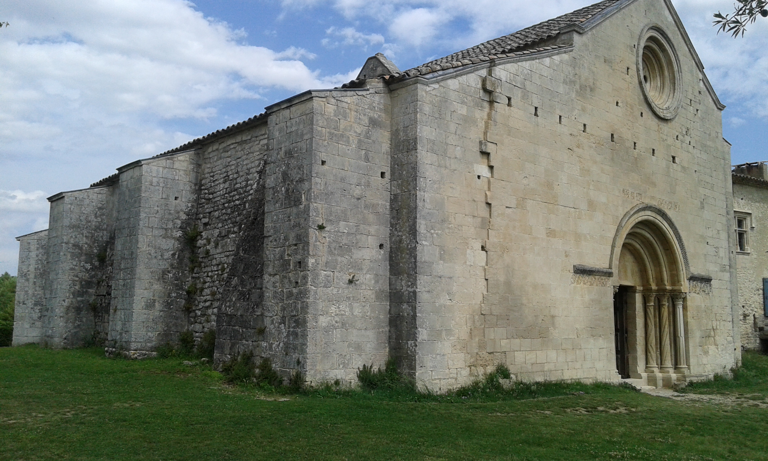 Le Priurè de Mane Categoria:Rodano-Alpi Categoria:Francia